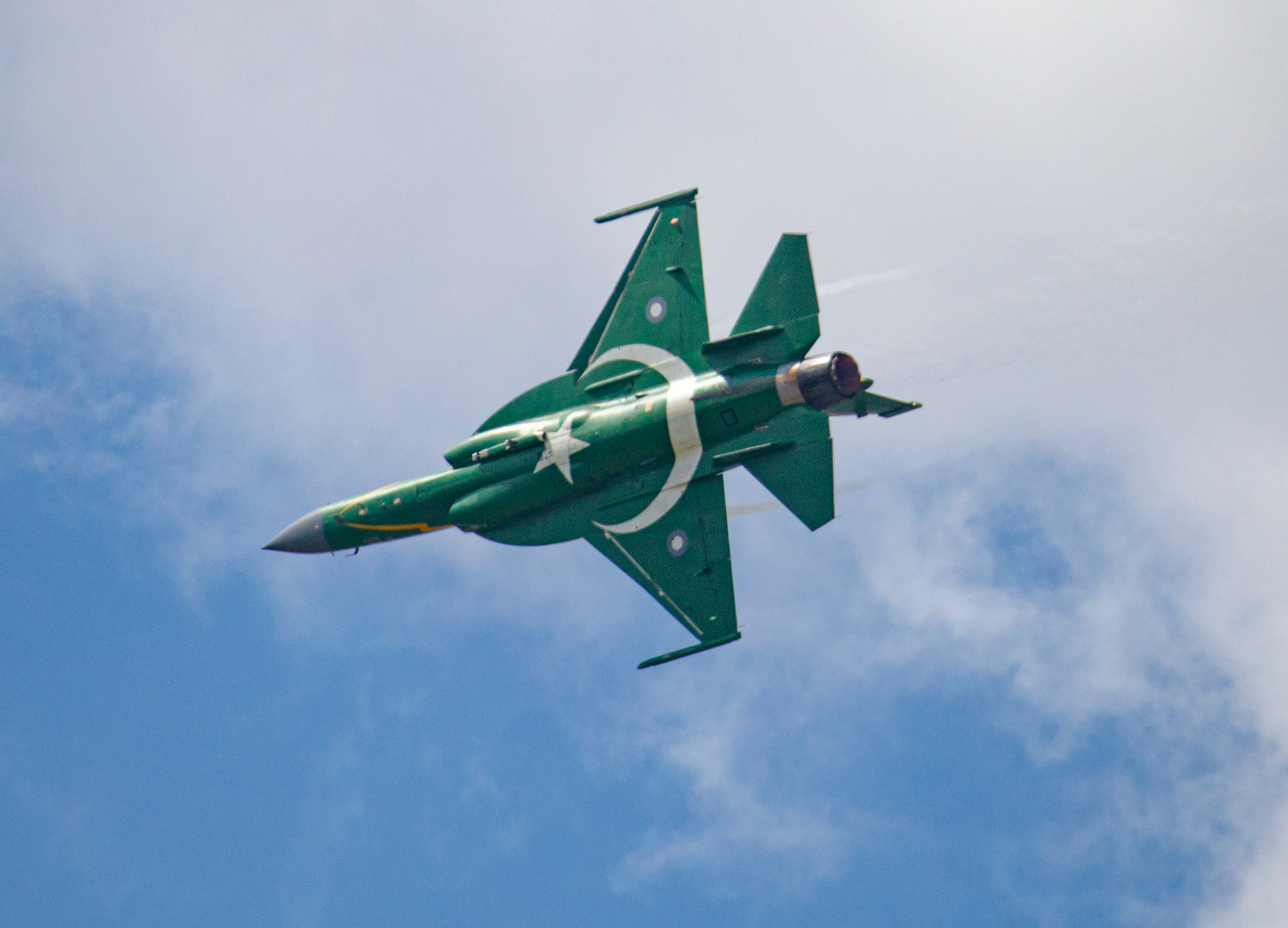 PAC JF-17